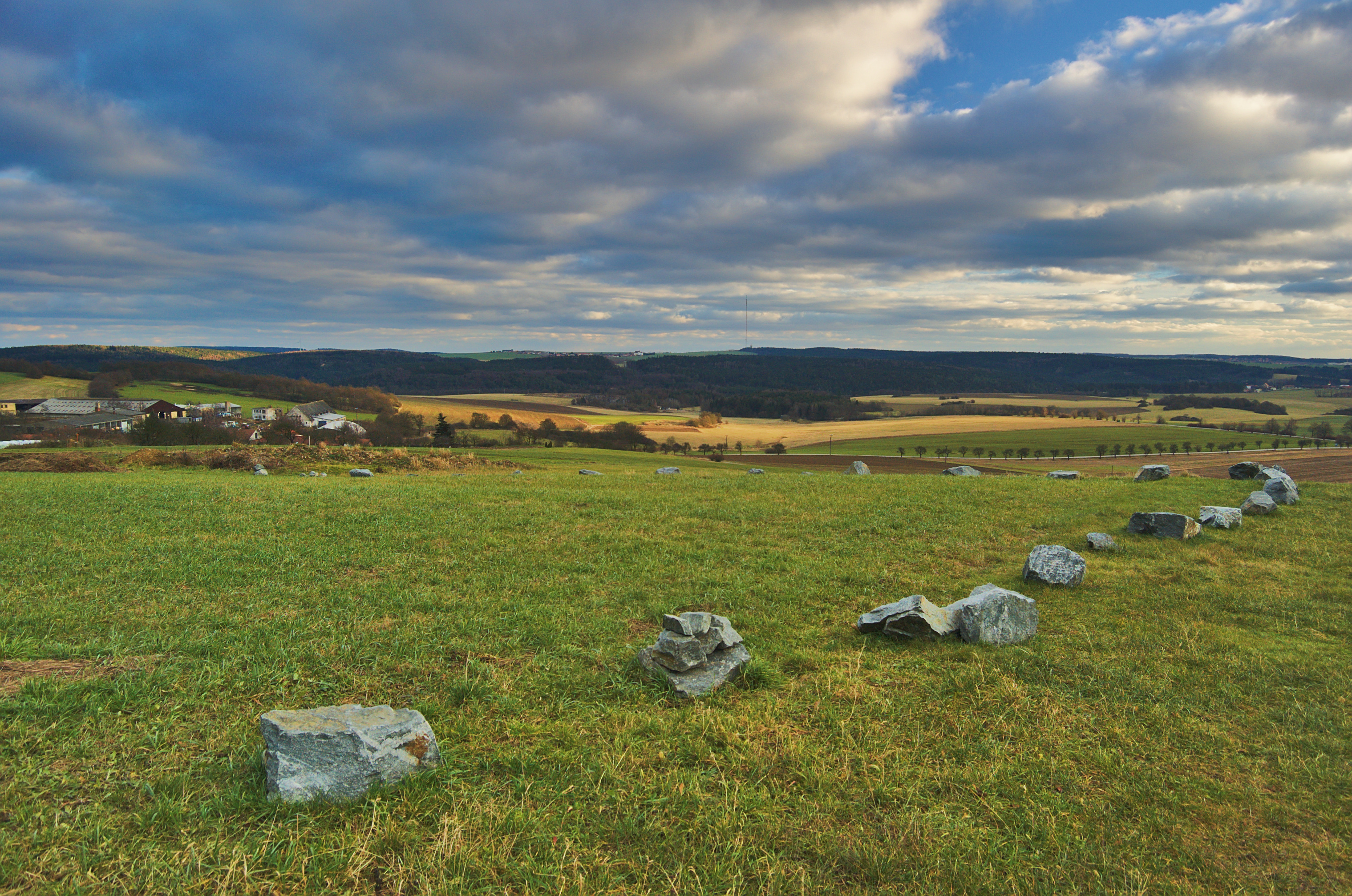 Pohled na zemědělské družstvo od západu, Šošůvka, okres Blansko